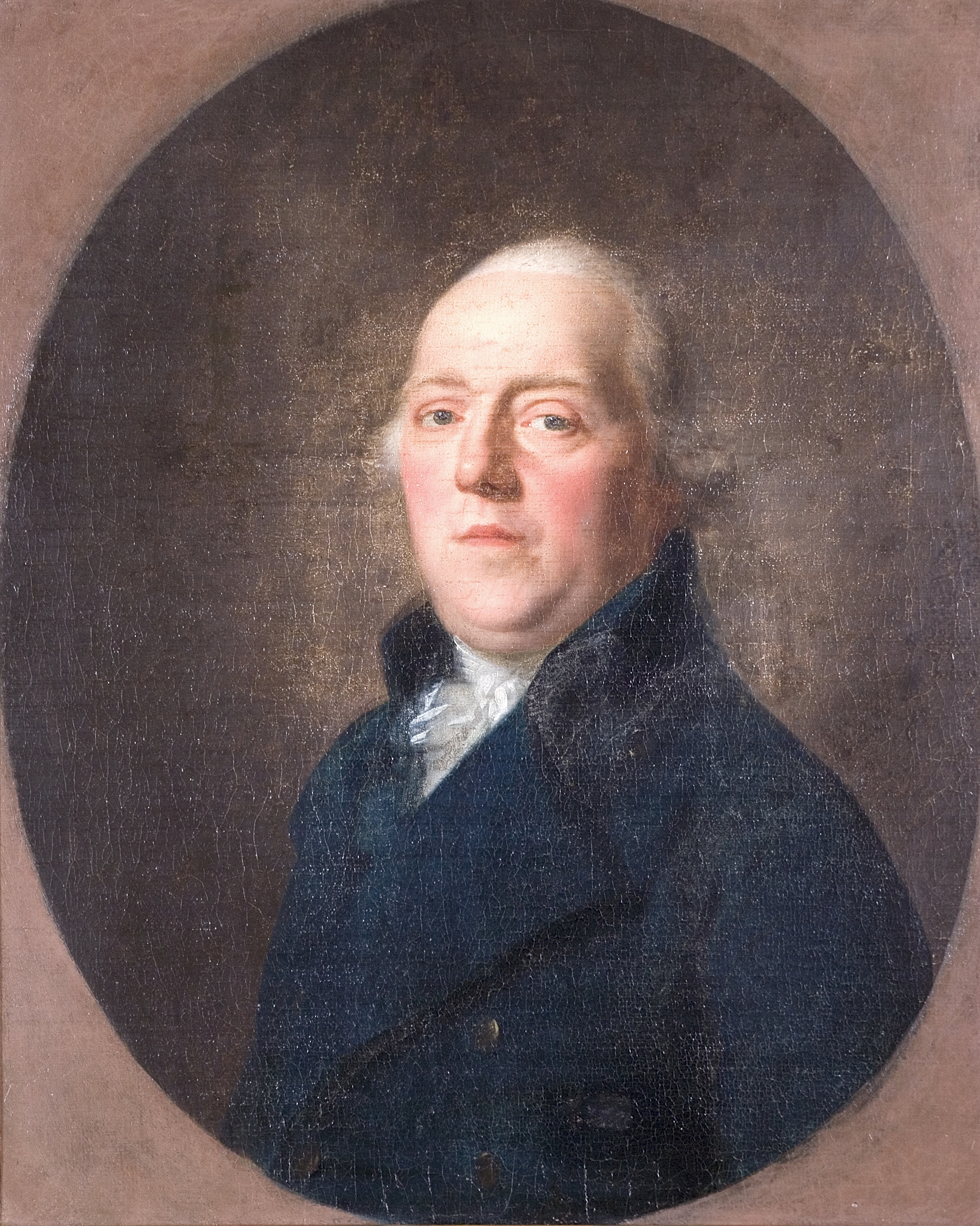 Apollonius Jan Cornelis baron Lampsins heer van Swieten door J.F.A. Tieschbein